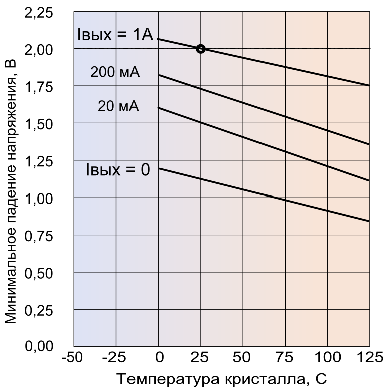 Зависимость минимального падения напряжения на ИС семейства NPC 7800 от тока и температуры